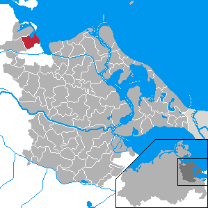 Neuenkirchen, Landkreis Ostvorpommern, Mecklenburg-Vorpommern